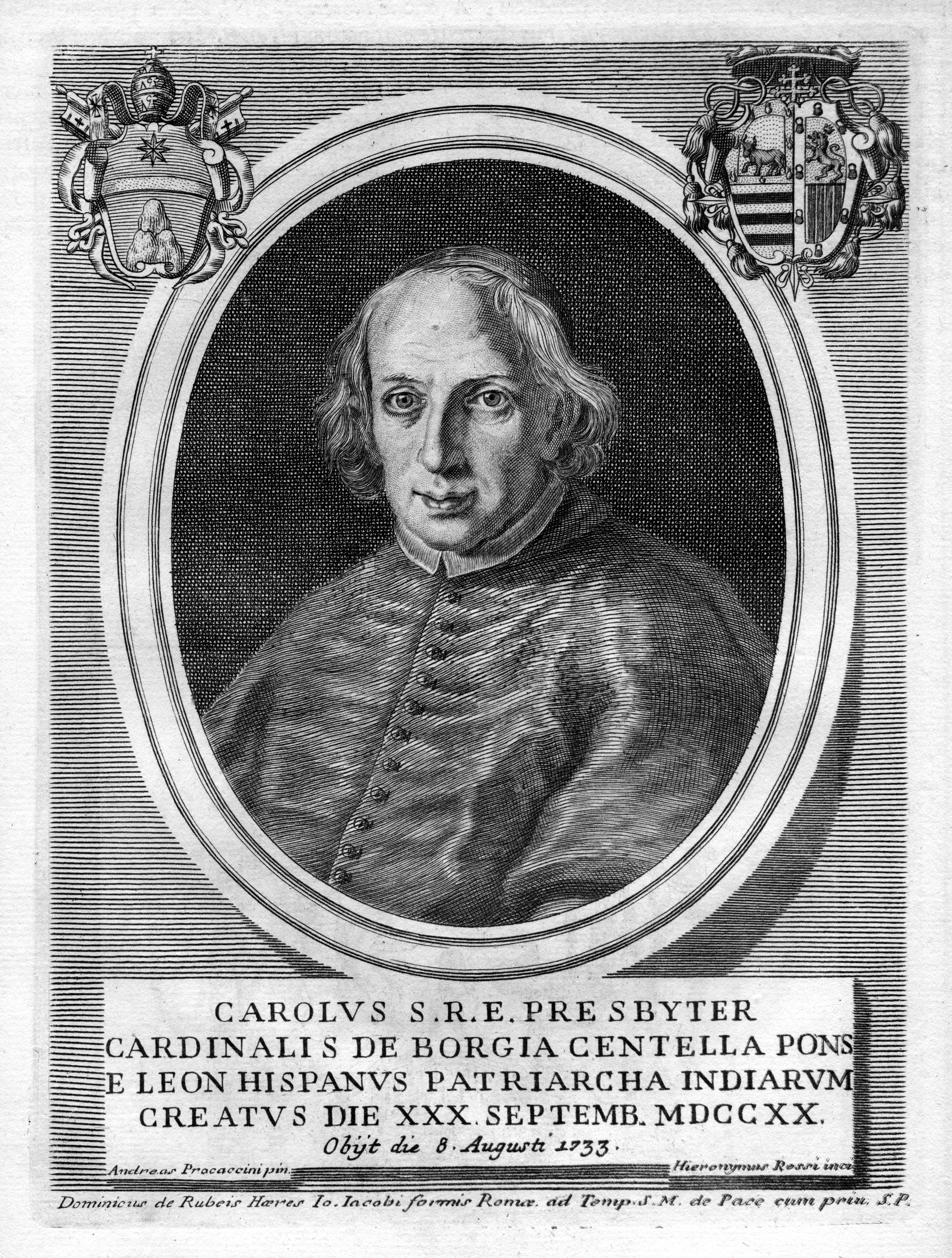 Portrait de Carlos de Borja y Centellas (1663-1733)